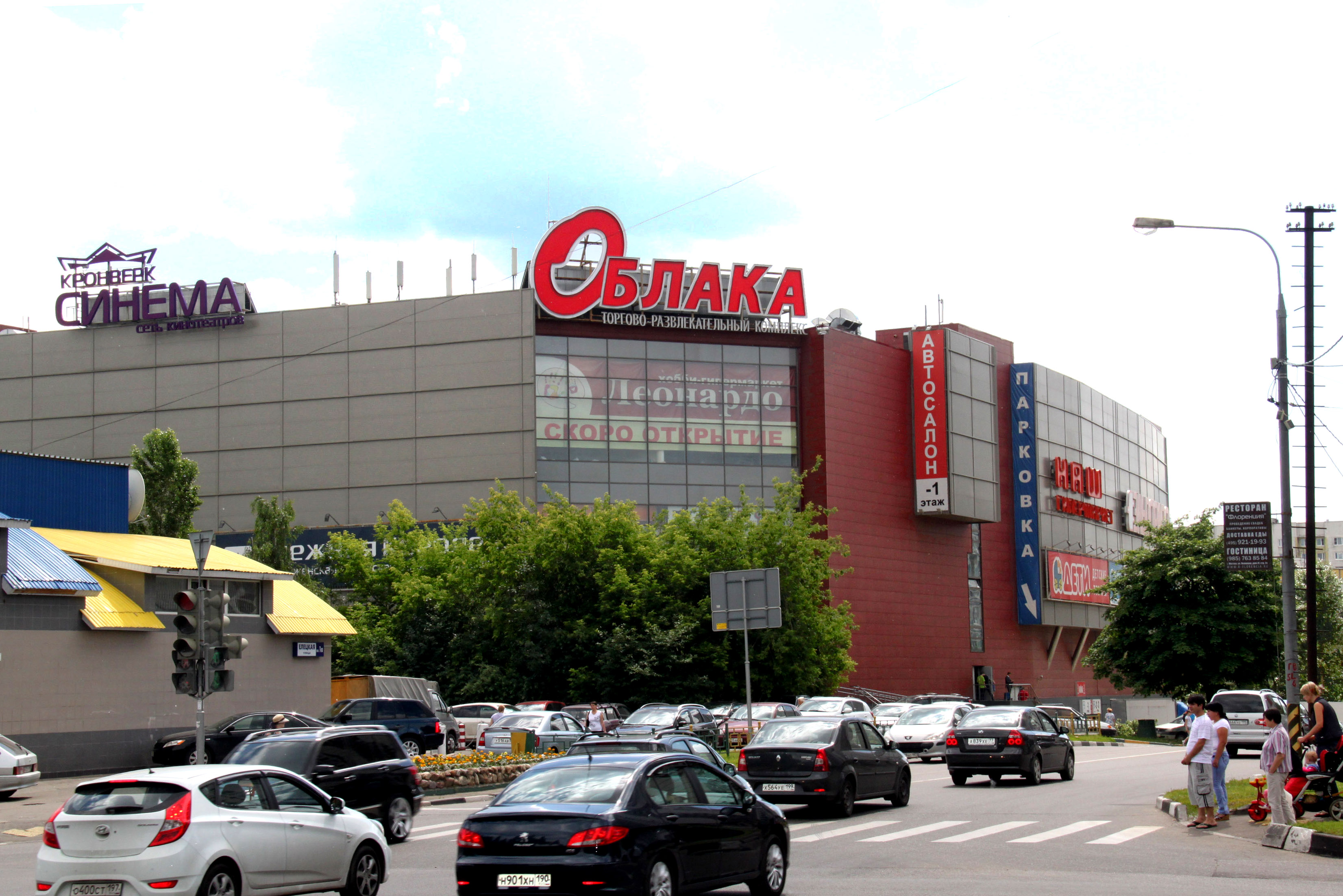 Торгово-развлекательный комплекс Облака